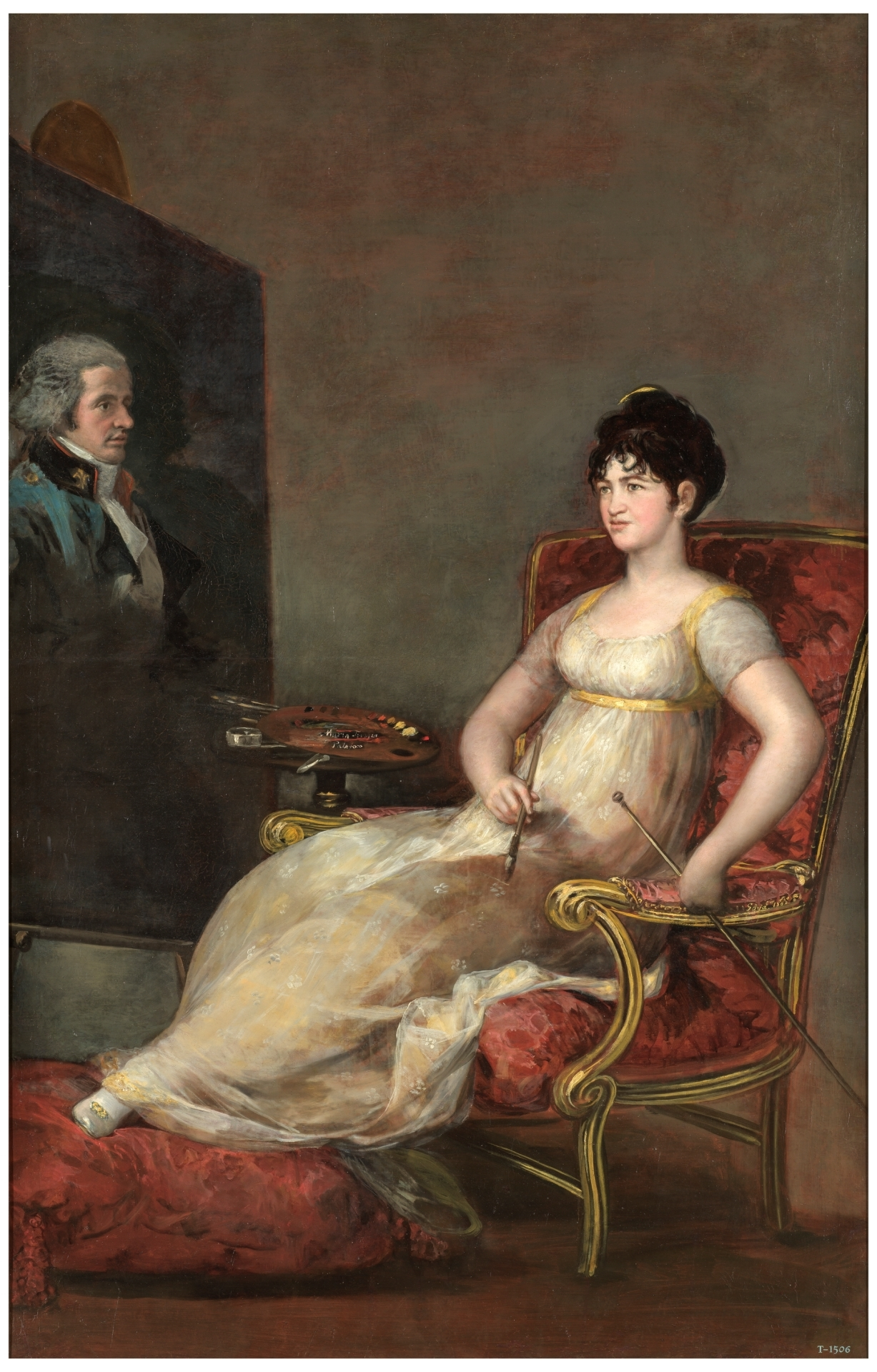 La XII marquesa de Villafranca pintando el retrato de su esposoThe Marchioness of Villafranca Painting her Husbandlabel QS:Les,"La XII marquesa de Villafranca pintando el retrato de su esposo"label QS:Len,"The Marchioness of Villafranca Painting her Husband"